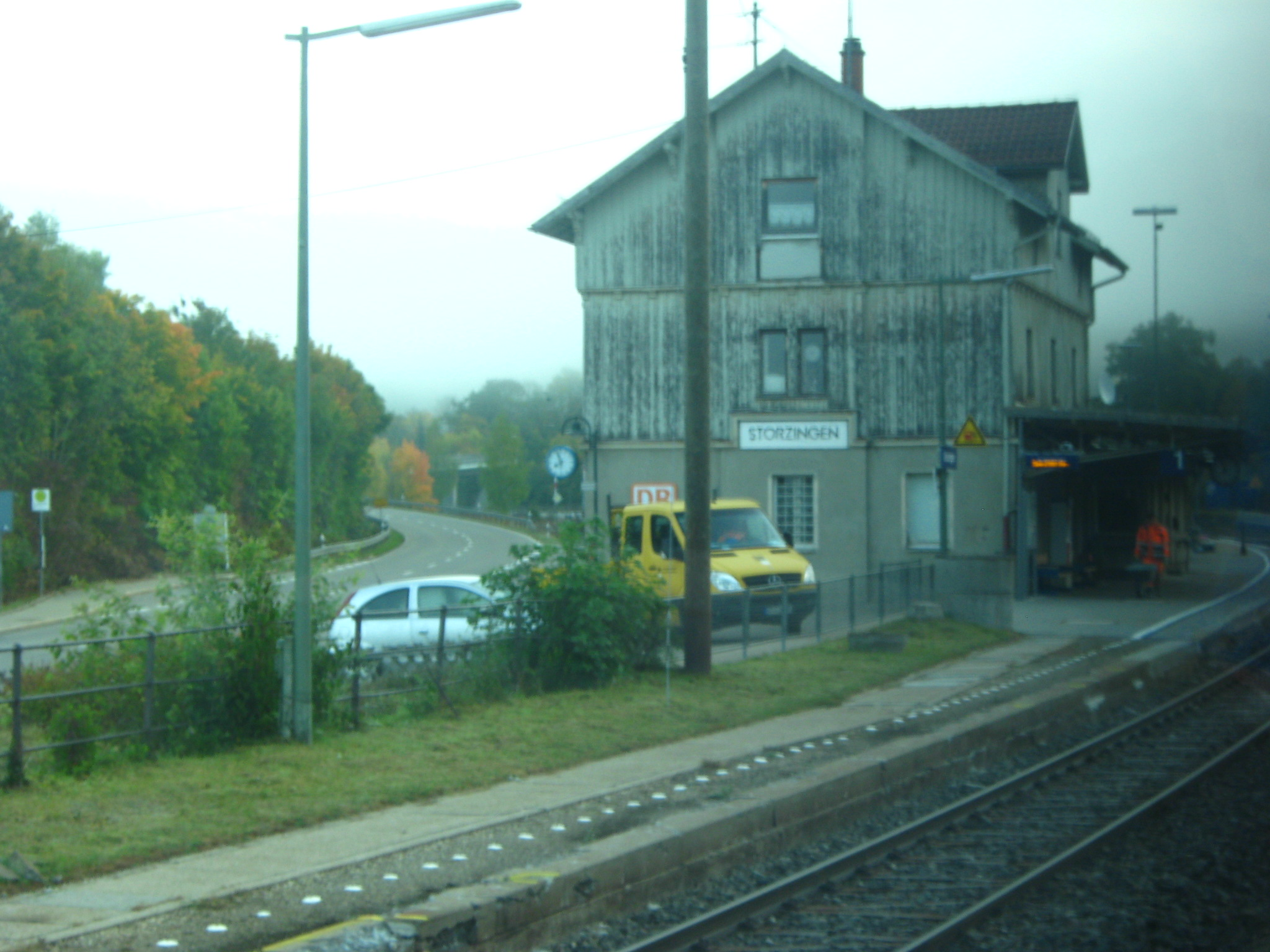 Der Bahnhof Storzingen liegt in Storzingen an der Bahnstrecke der Zollernalbbahn zwischen Tübingen und Sigmaringen. Am Bahnhof gibt es Bushaltestellen.